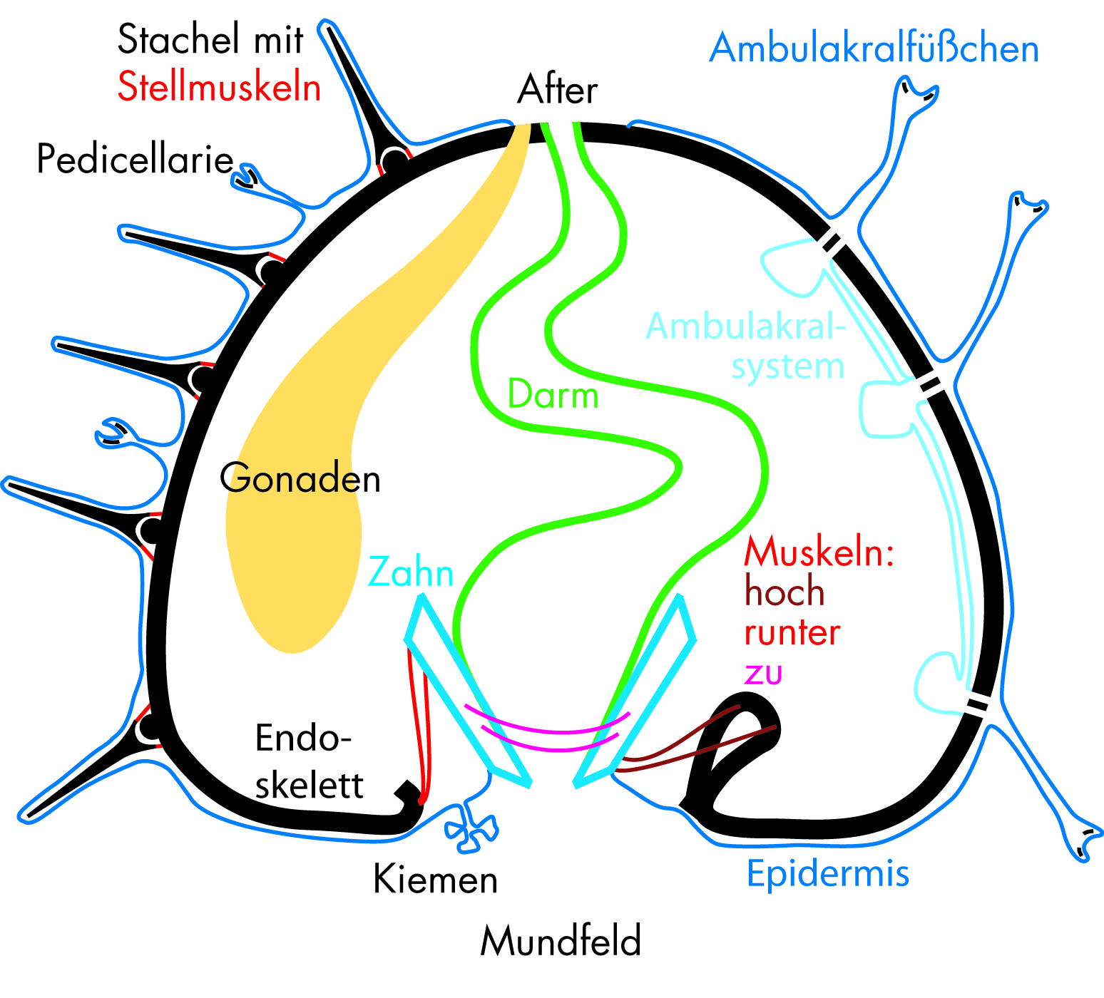 Please quote: "G. Weitbrecht, wikimedia commons". Schematischer Aufbau eines Seeigels im Querschnitt. Links durch stacheltragende Bereiche und rechts durch Ambulakralplatten.